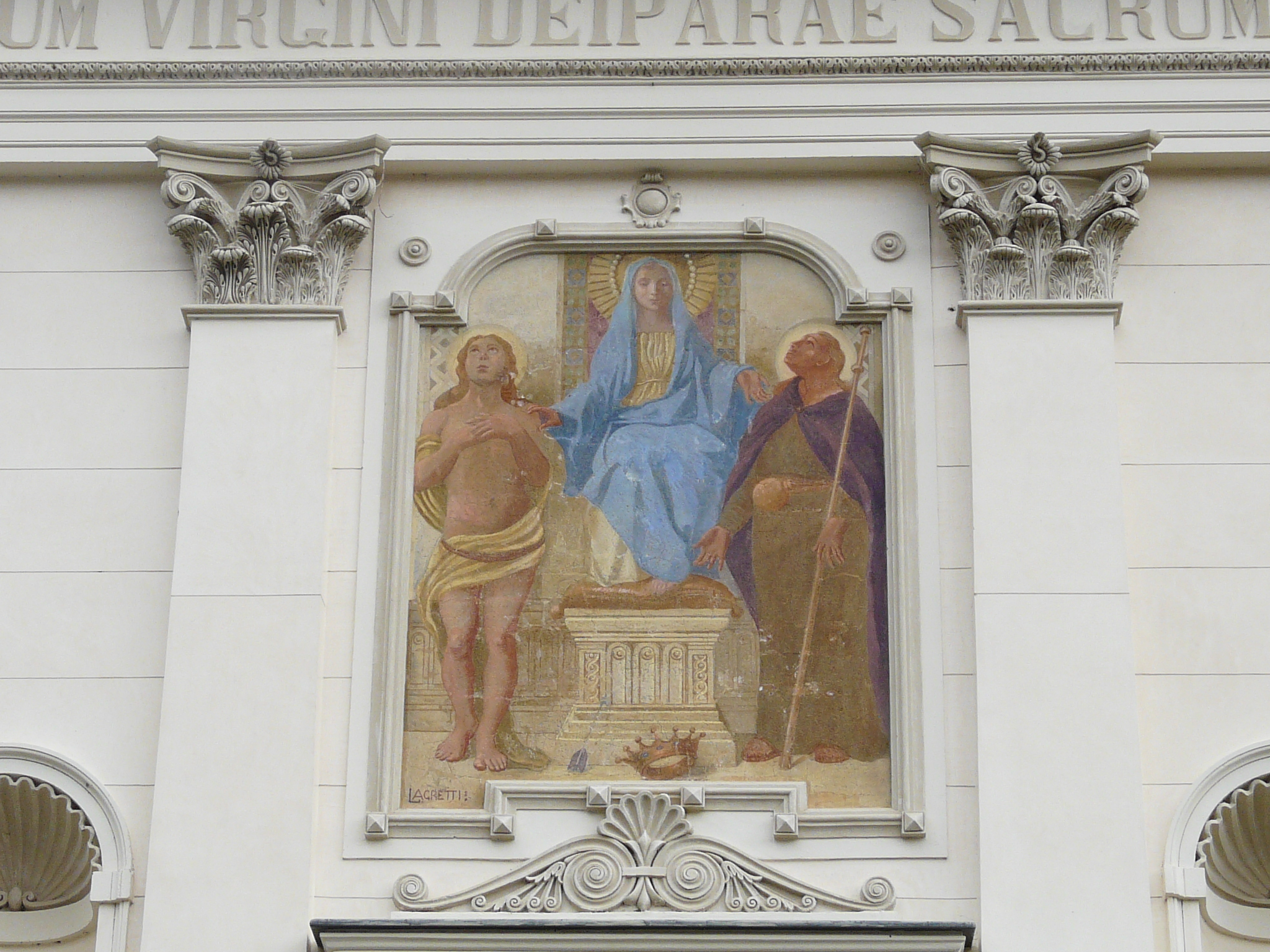 Affresco della Chiesa di Santa Maria, Santa Maria di Sturla, Carasco, Liguria, Italia